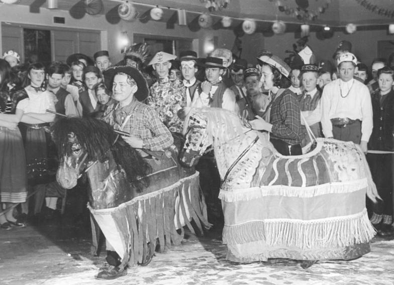 Sonneberg, Fest für Jugendweiheteilnehmer Zentralbild Kornmann Vgt-Noa 8.2.1958 500 Jugendweiheteilnehmer feierten Fest des Friedens 500 Jugendliche aus allen Schulen des südlichsten Kreises der DDR, Sonneberg, feierten am 6.2.1958 im Gesellschaftshaus der Spielzeugstadt ein Fest des Friedens. (Näheres siehe ADN-Meldung vom 6.2.1958 Nr. 243). UBz: Jugendweiheteilnehmer gestalteten ein lustiges Zirkusprogramm.